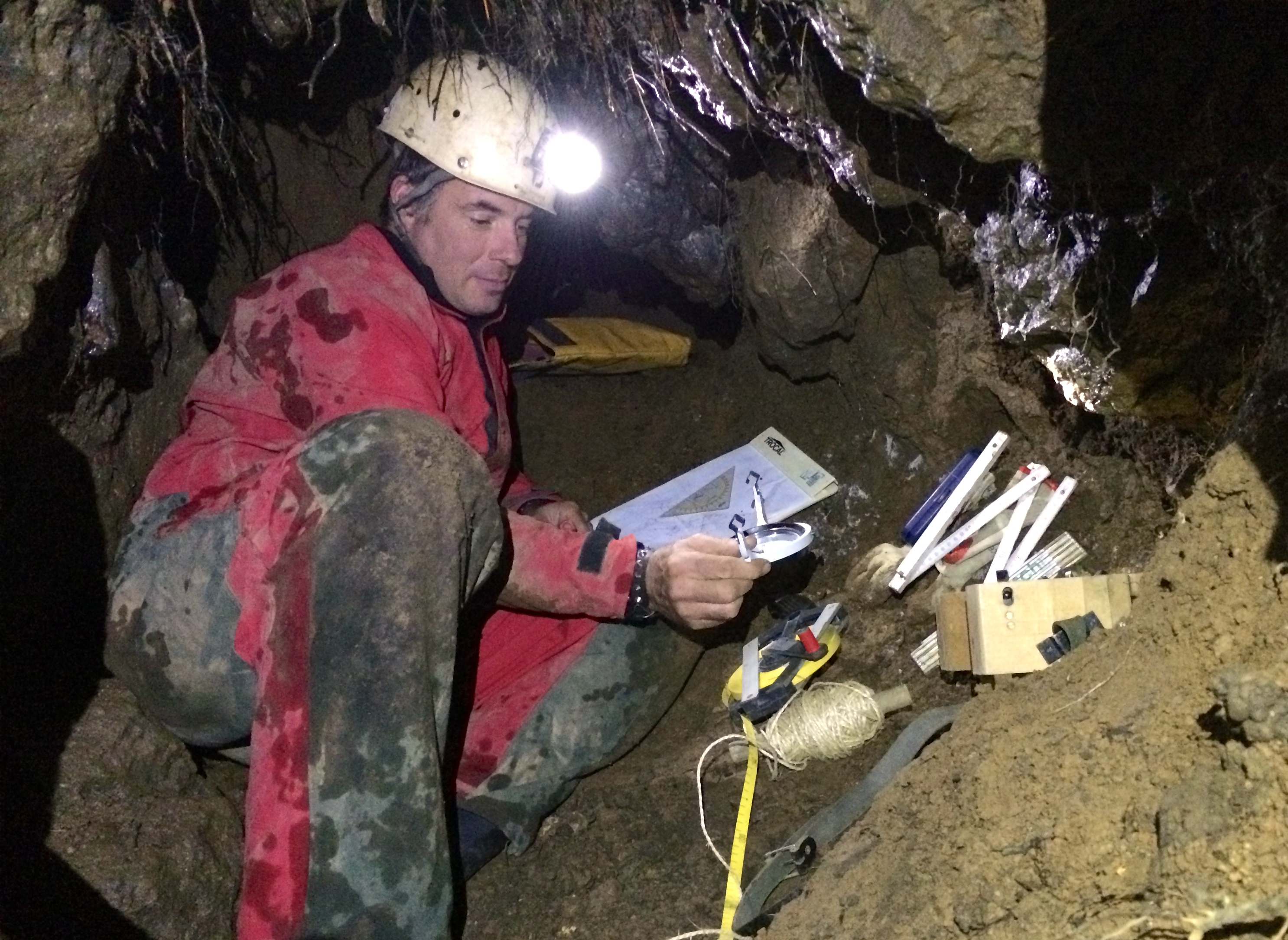 Höhlenforscher bei der Vermessung einer Kleinhöhle in Ennepetal.